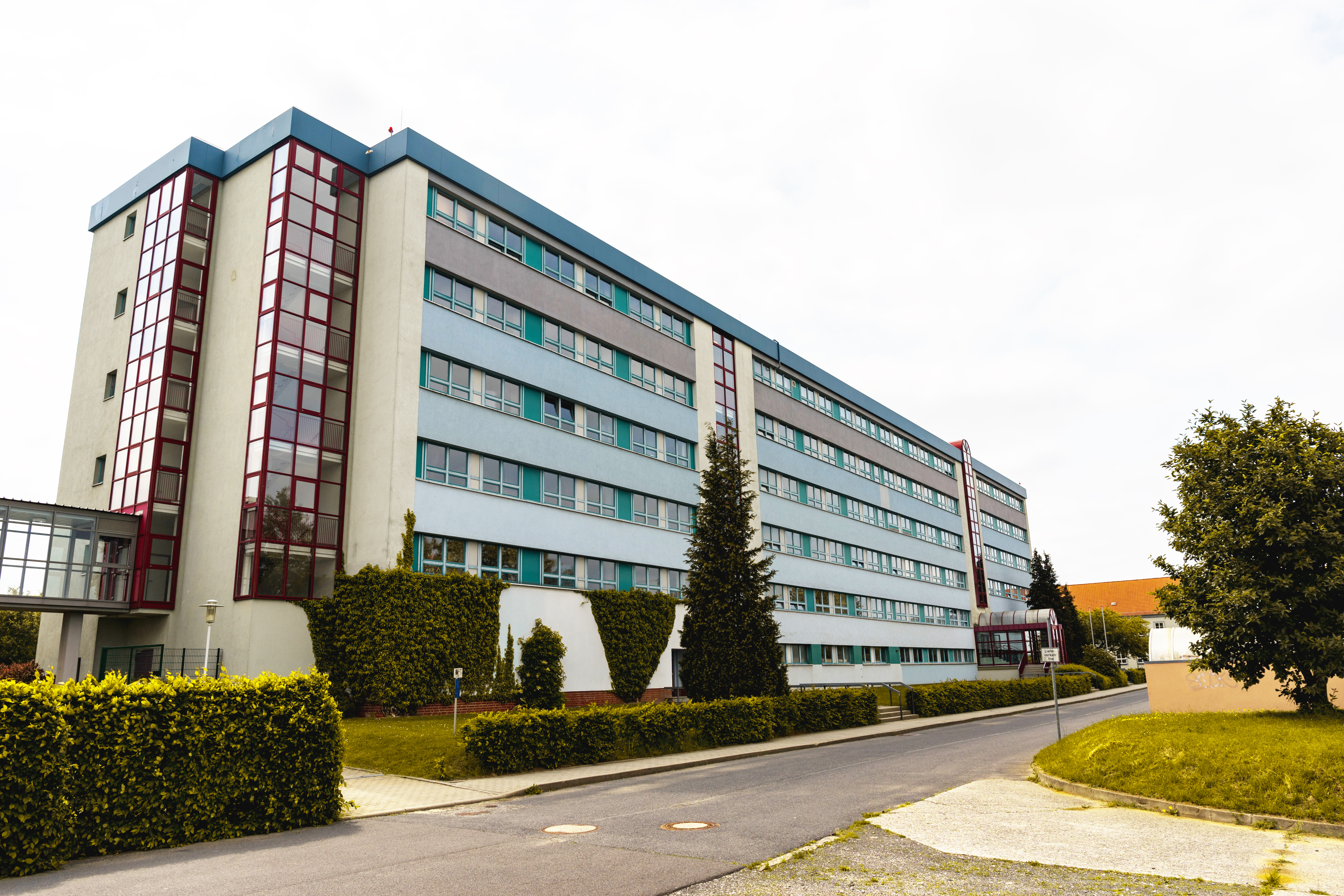 Aussenansicht